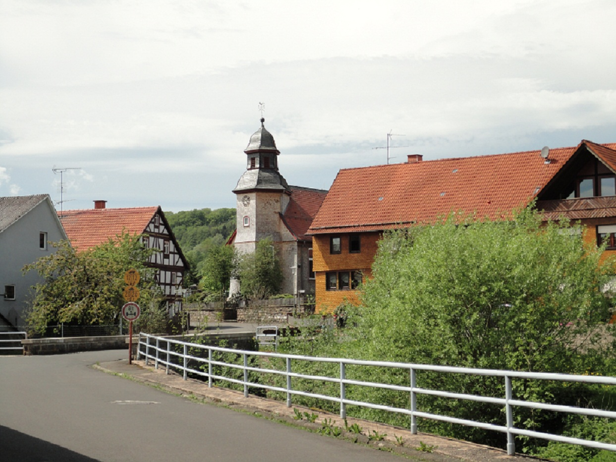 Dorfidylle an der Felsentour in Lanzenhain